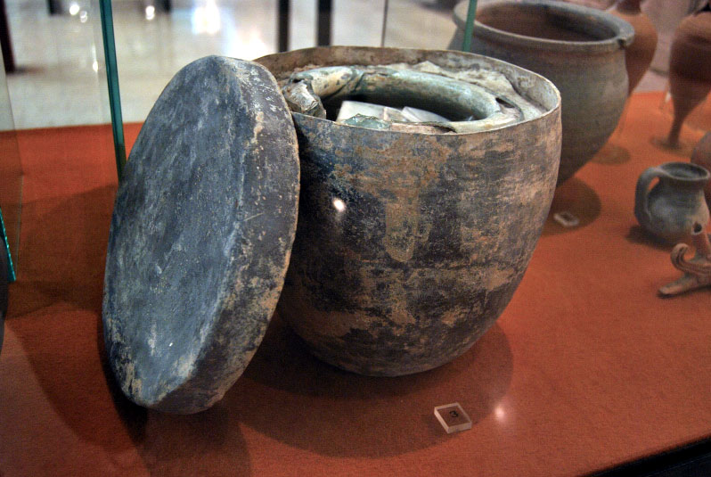 Urna cineraria romana. Museo Arqueológico de Cartagena